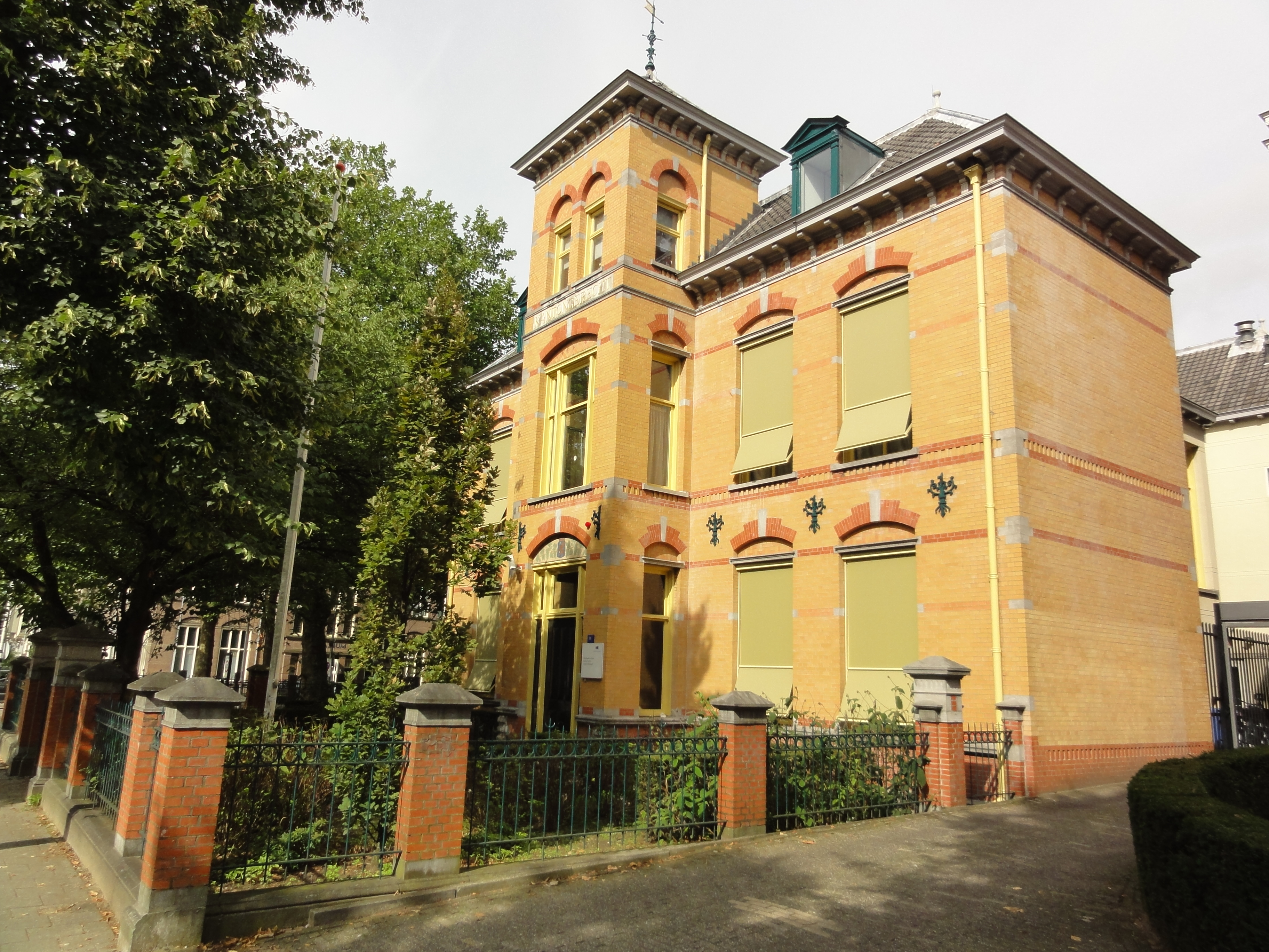 Nijmegen Rijksmonument 522988 Kantongerecht Oranjesingel 56